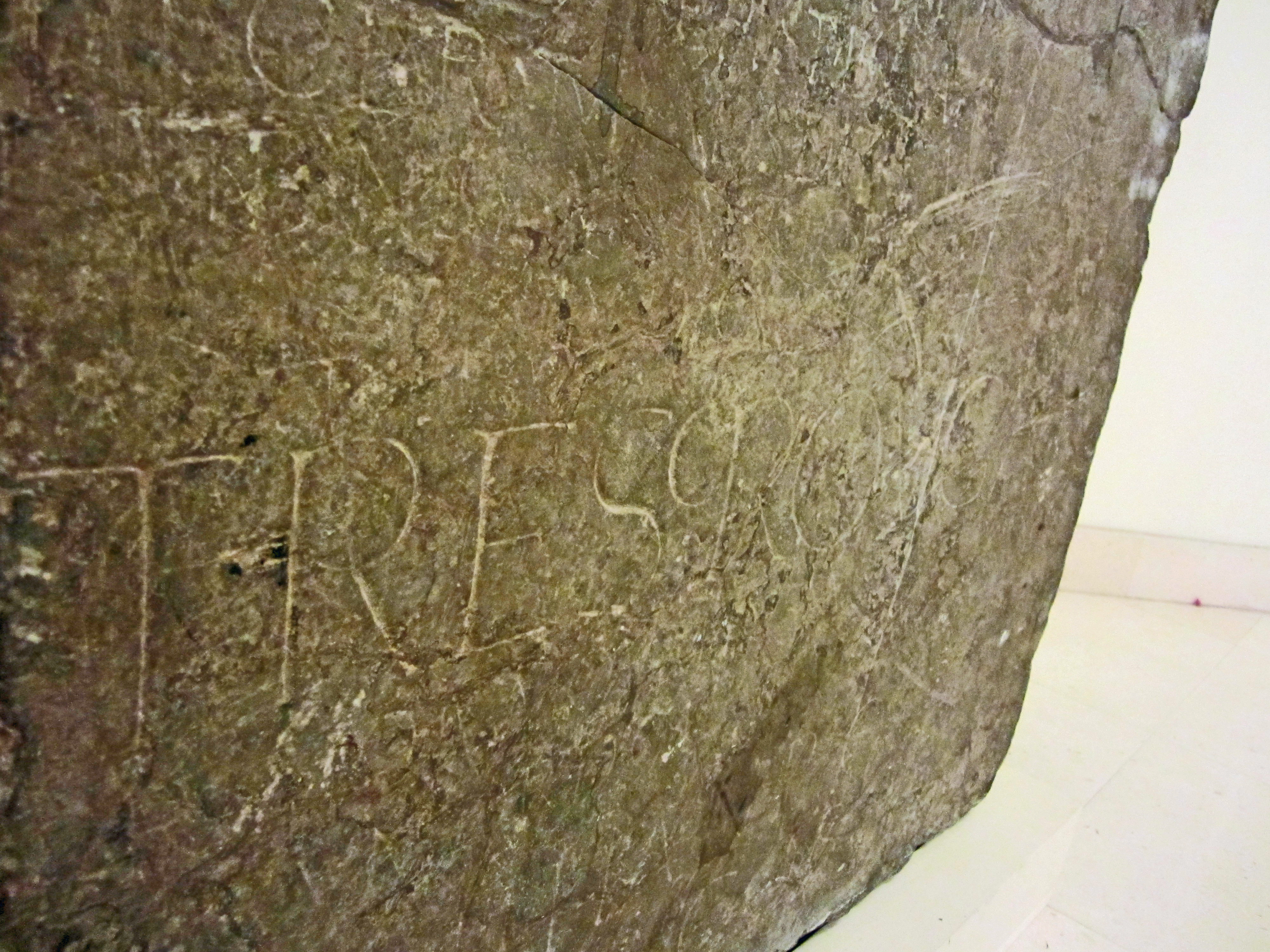 Marbre de Thorigny